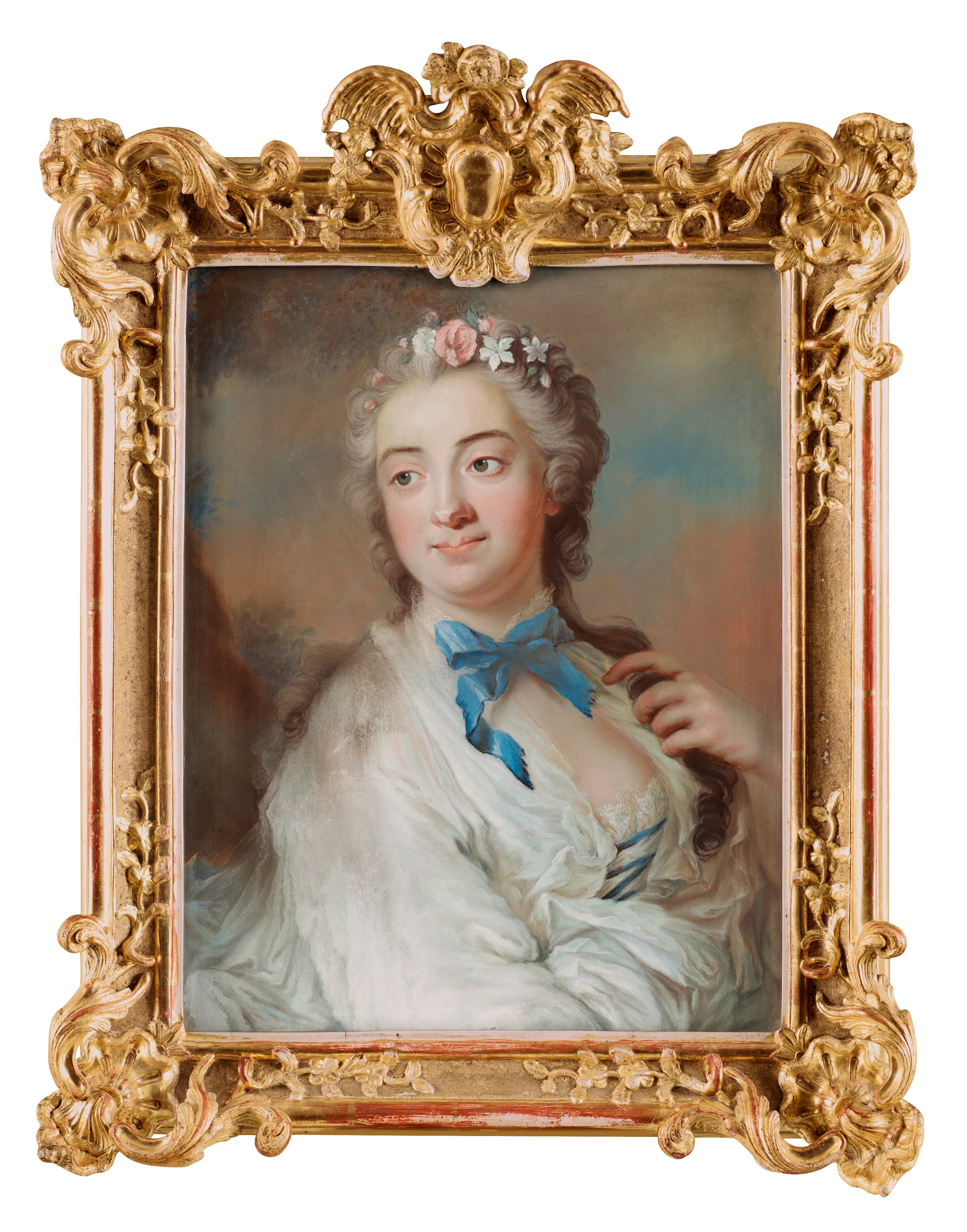 Countess Charlotta Fredrika von Fersen, née Sparre (1717-1795).label QS:Len,"Countess Charlotta Fredrika von Fersen, née Sparre (1717-1795)."